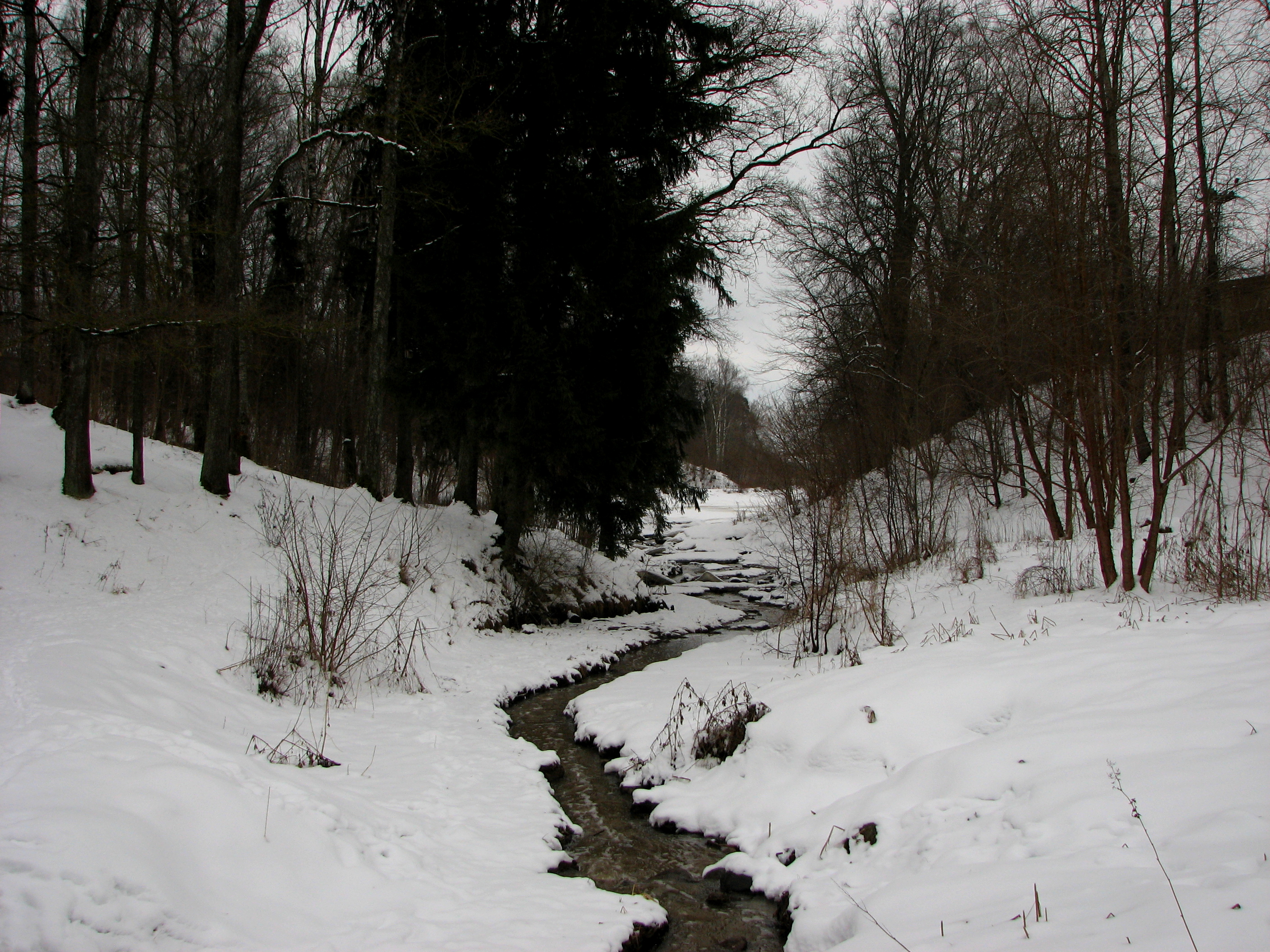 Aizkraukle_03